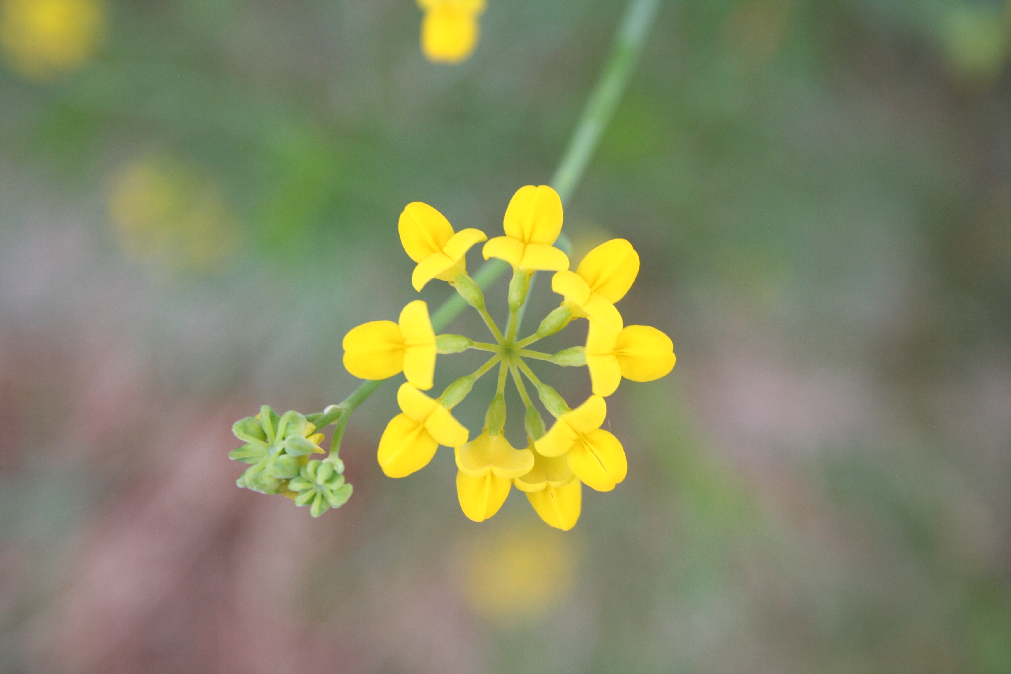 Coronilla minima en el Parque Natural de la Albufera de Valencia.